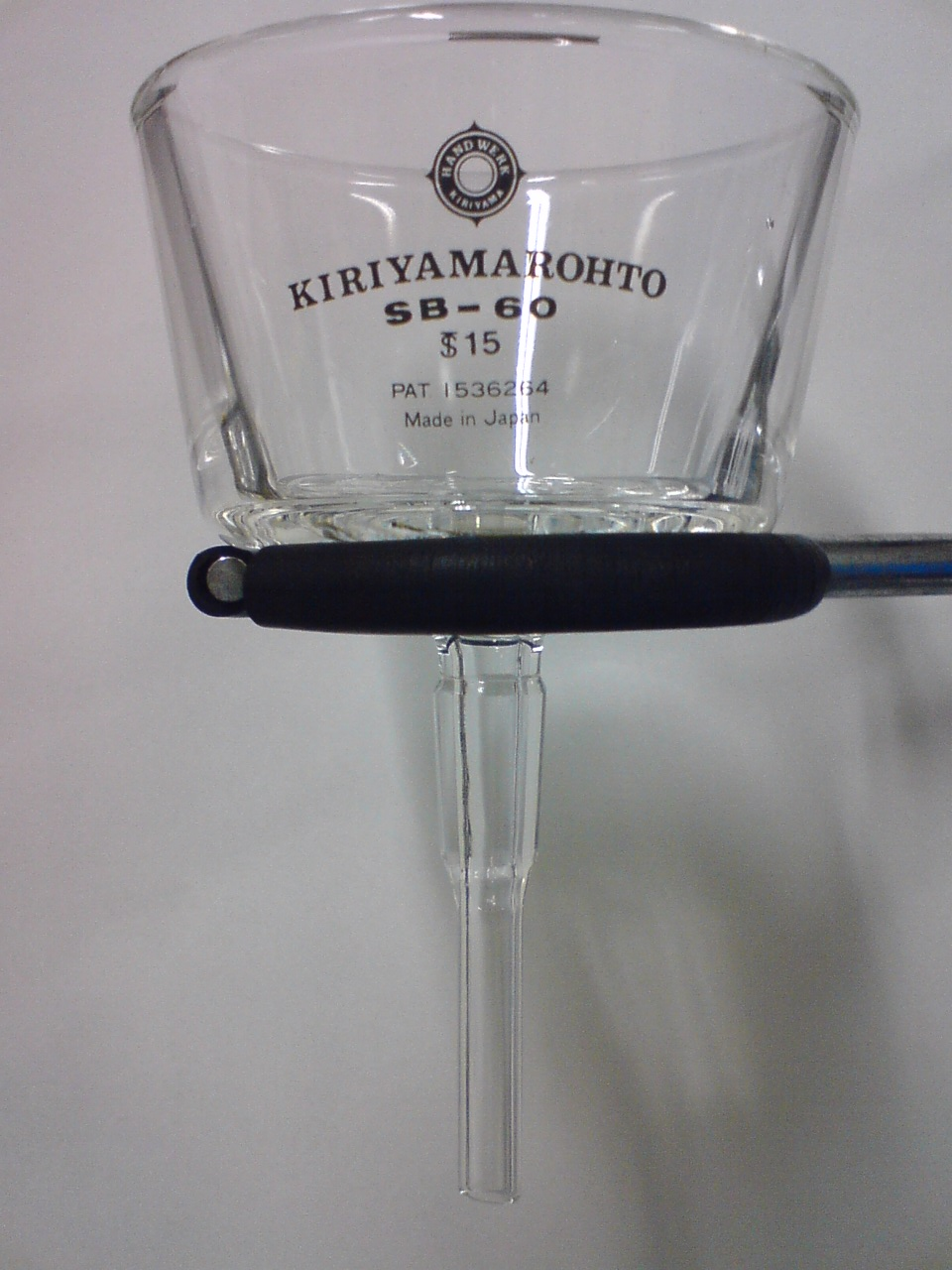 横からみら桐山ロート。